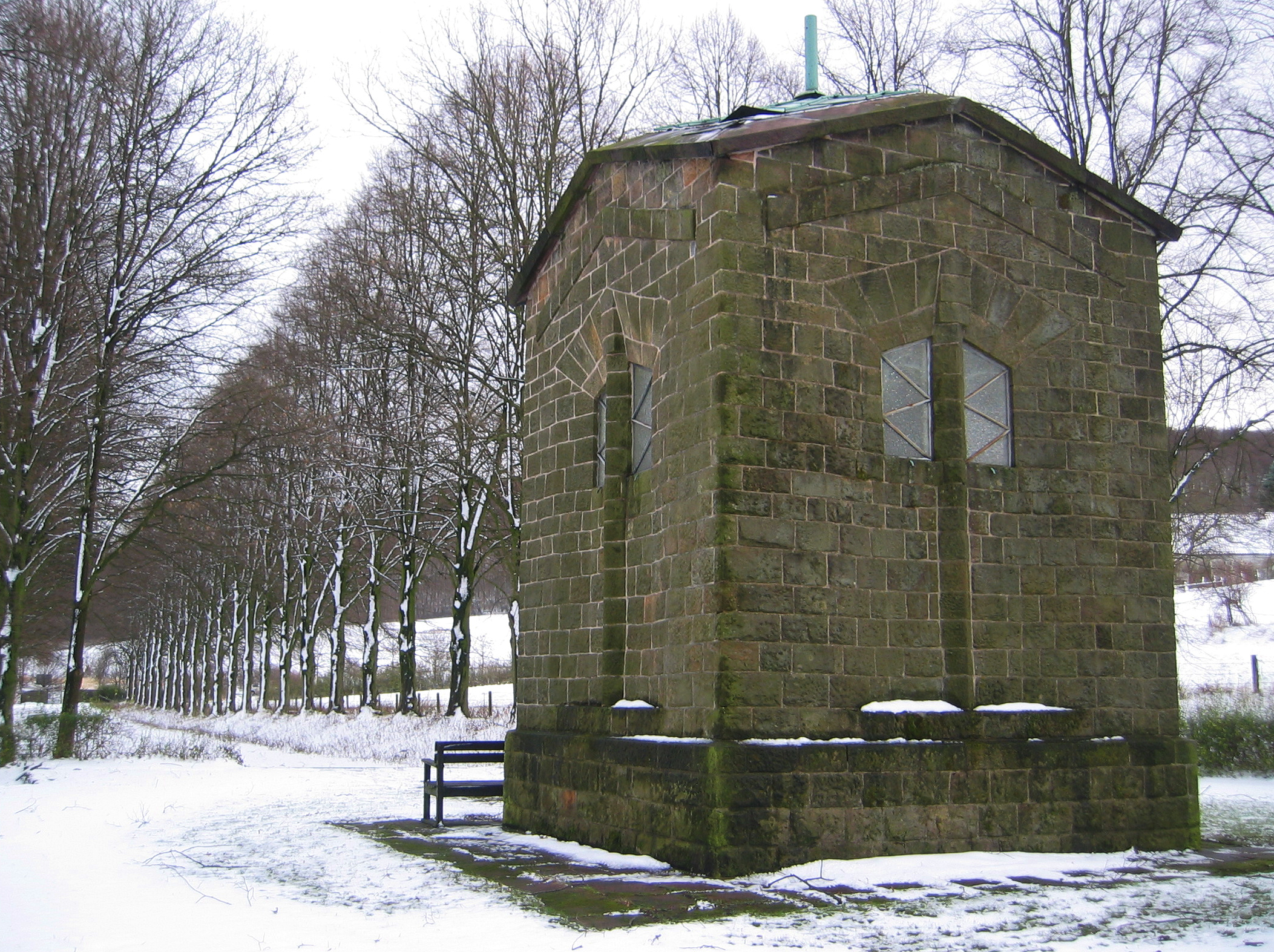 Rückseite des Carl-Gustav-Rommenhöller-Denkmals bei Herste in Bad Driburg, Deutschland.